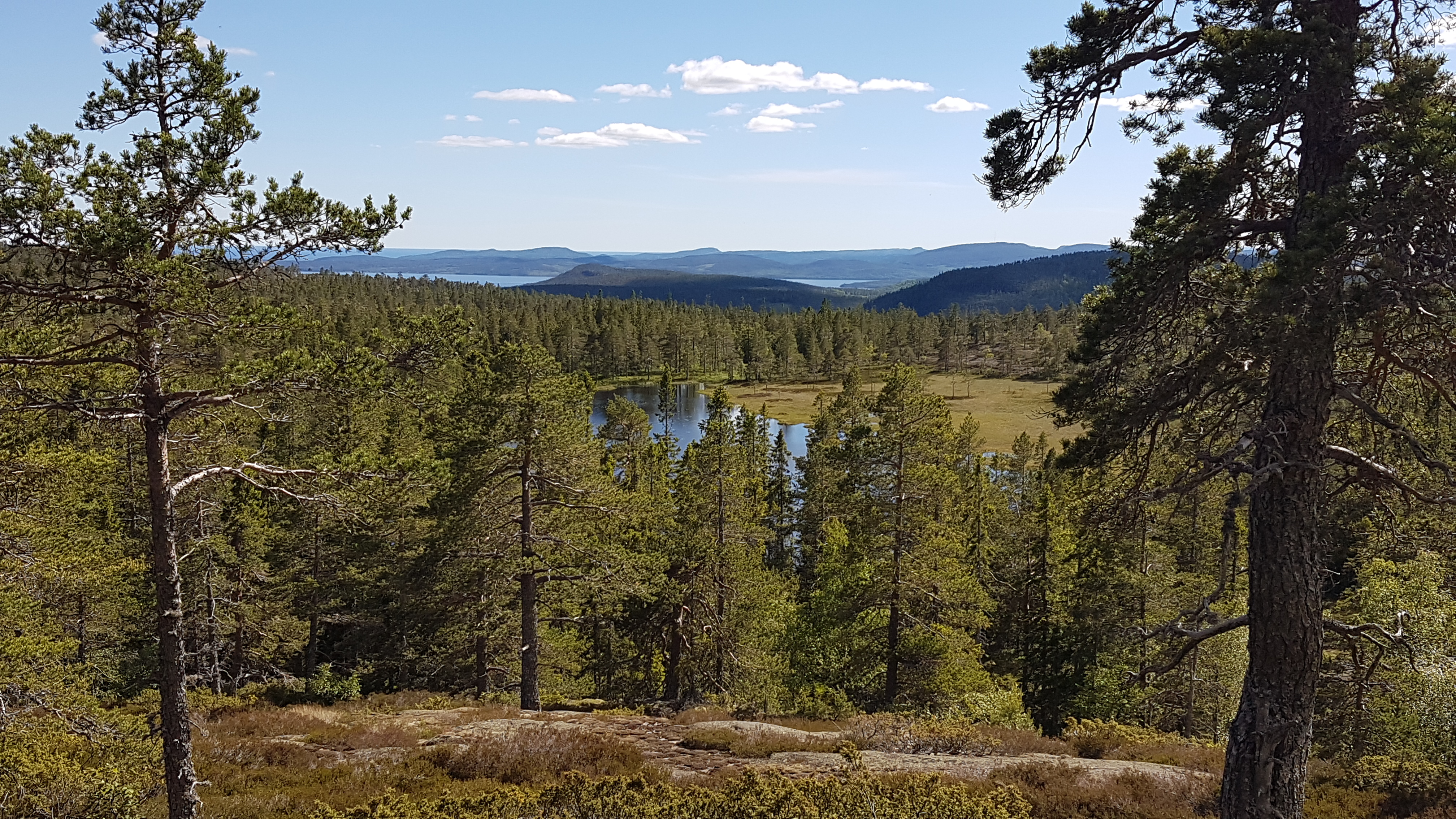 Lillråtjärnen i Skuleskogens nationalpark 2017.